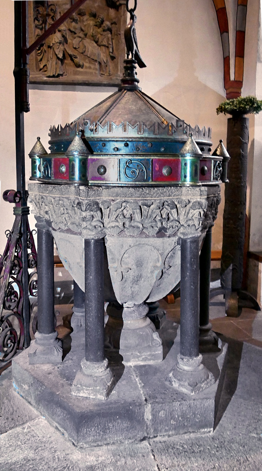 Katholische Kirche Maria Himmelfahrt in Andernach - Romanisches Taufbecken